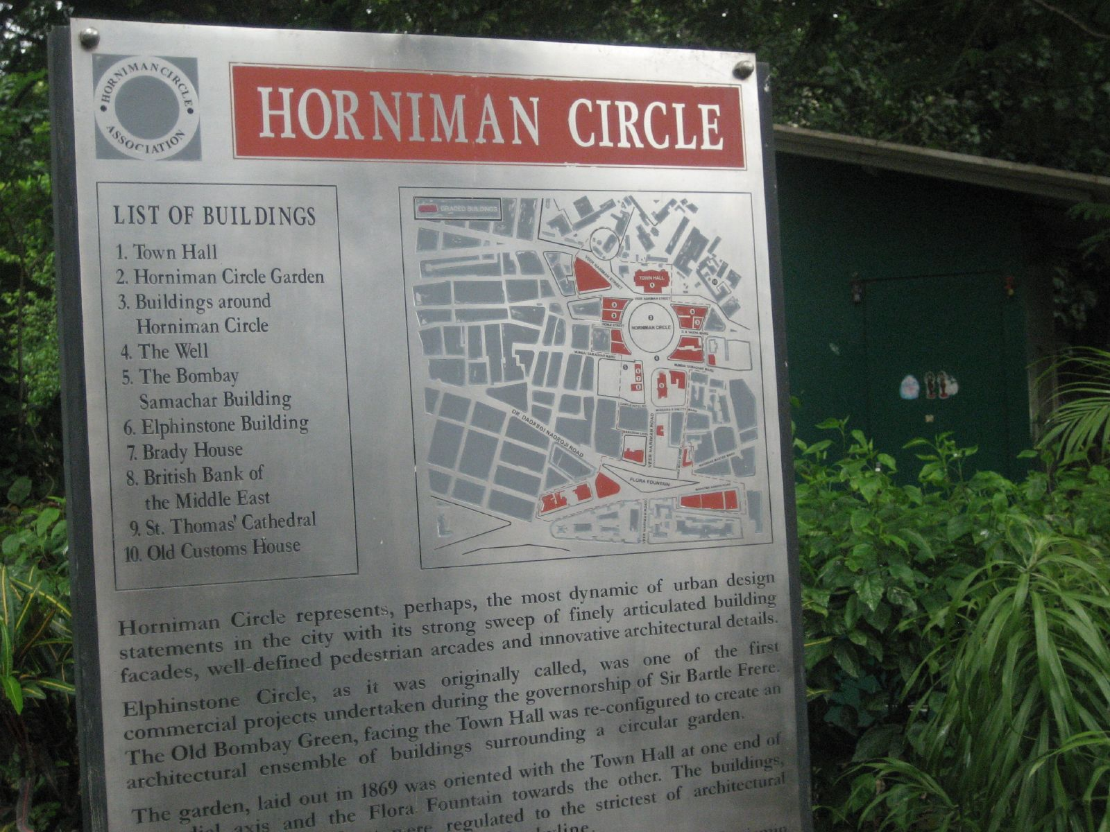 Horniman circle